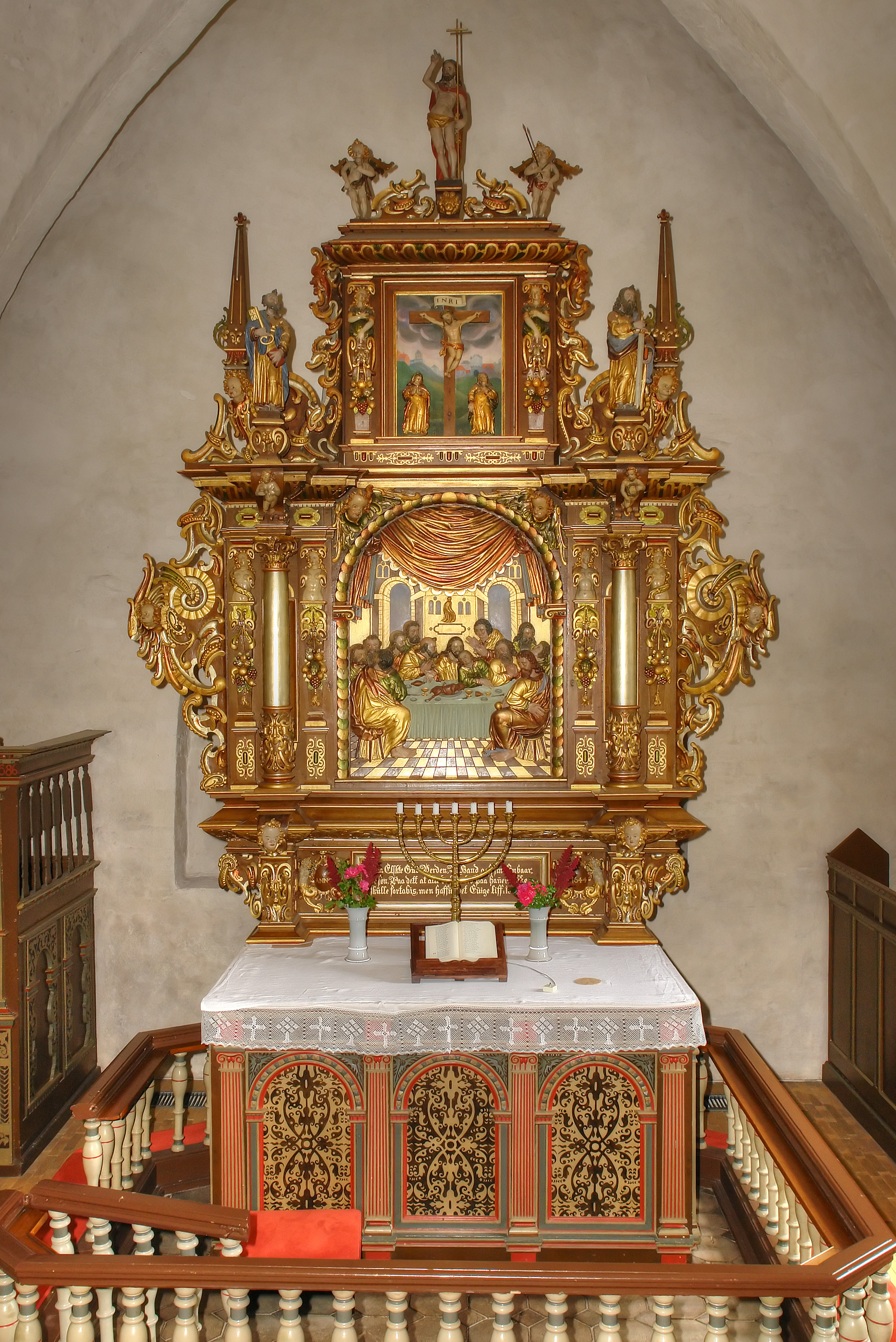 Kirche von Undløse, Dänemark (West-Seeland). Altar von 1644, vermutlich aus der Werkstatt von Abel Schrøder in Næstved. Altartisch (um 1575-1600)